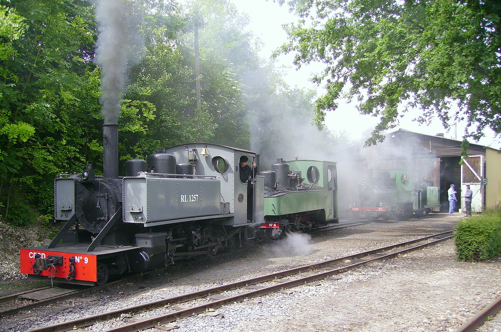 Le dépôt des locomotives du Chemin de fer Froissy-Cappy-Dompierre le 27 Mai 2007.